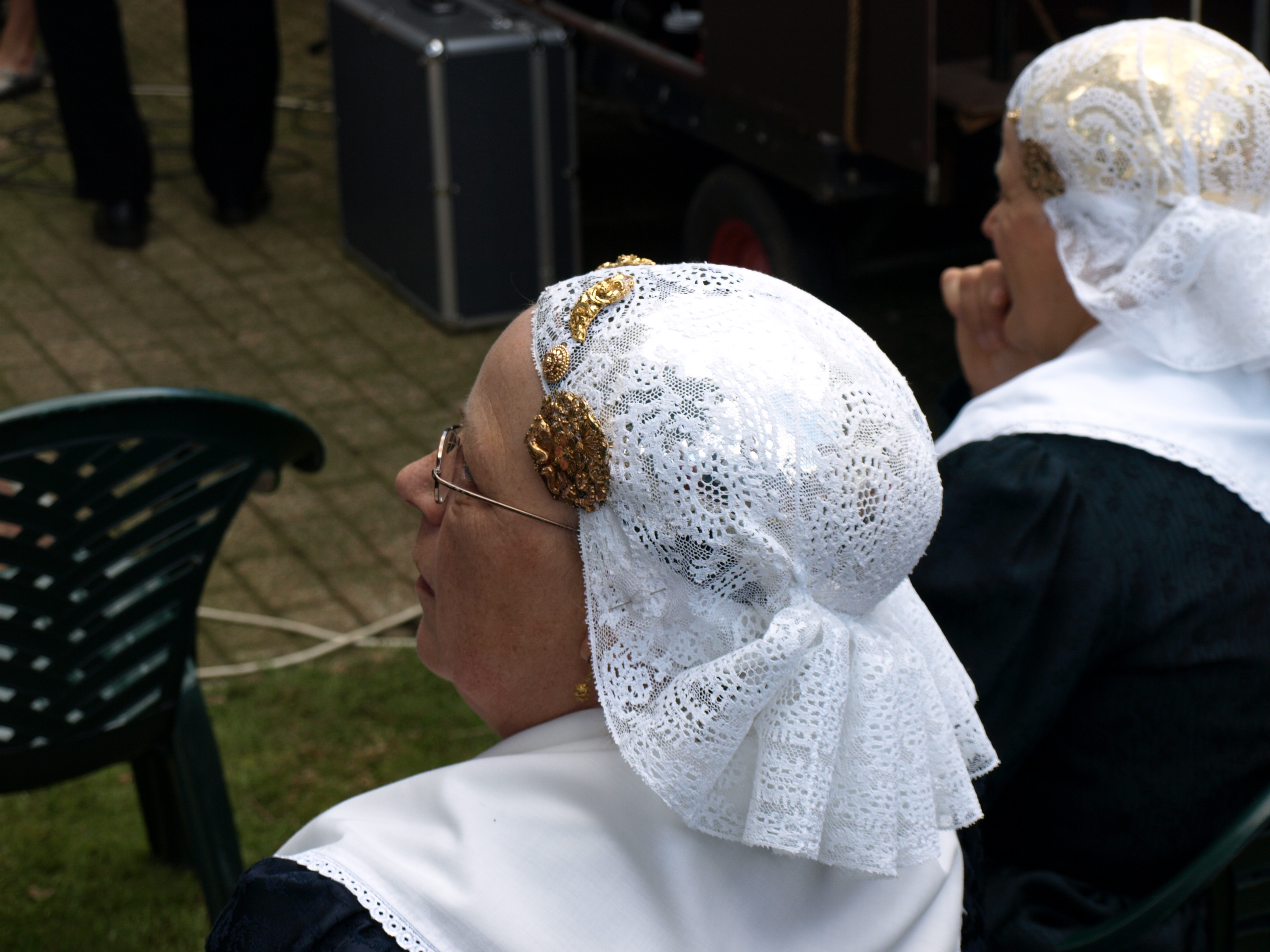 Drentse klederdracht: de dame links heeft zilveren oorijzers met op de kanten muts gouden rozetten. De dame rechts heeft gouden oorijzers. De oorijzers in Drentse dracht bedekken min of meer het hele hoofd.